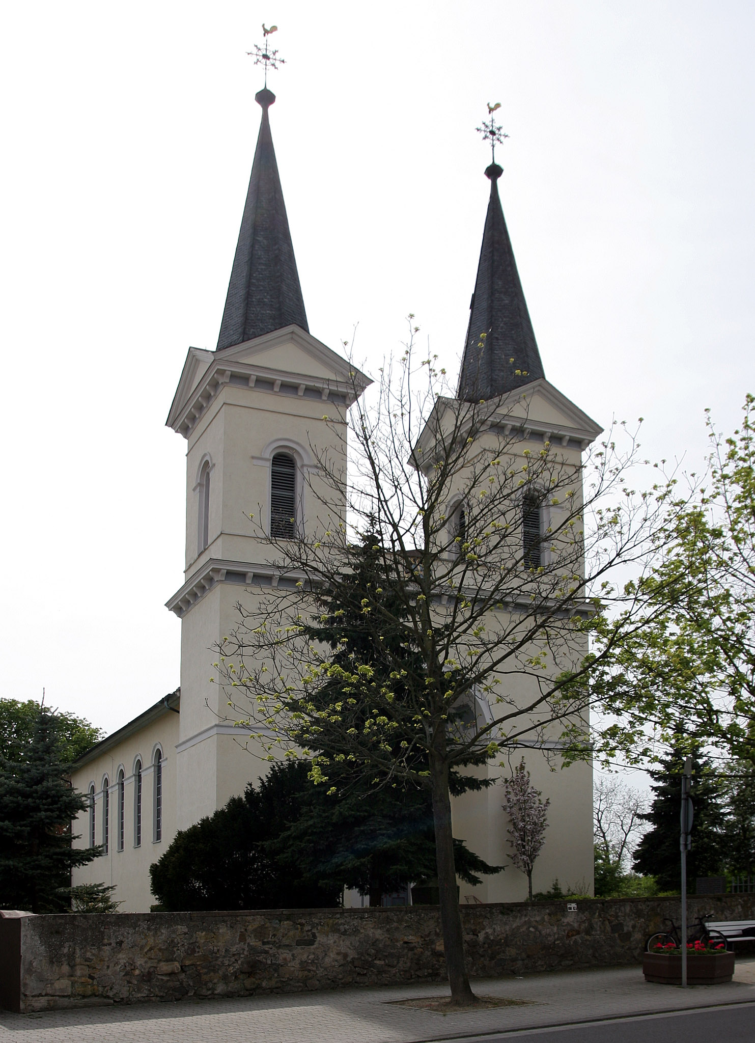 Die evangelische Kirche in der Rohrheimer Straße des Bensheimer Stadtteils Schwanheim